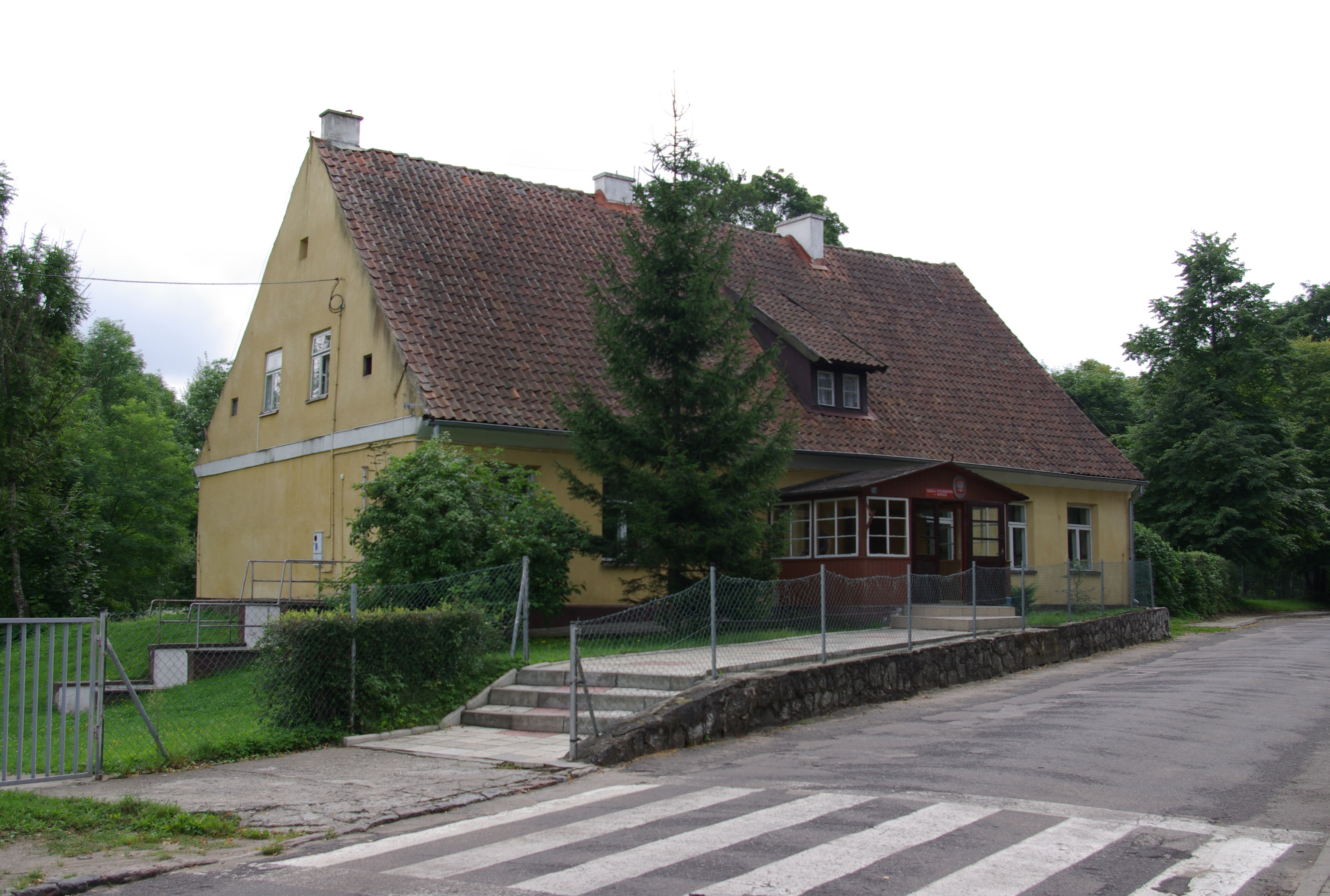 Kuty (województwo warmińsko-mazurskie)